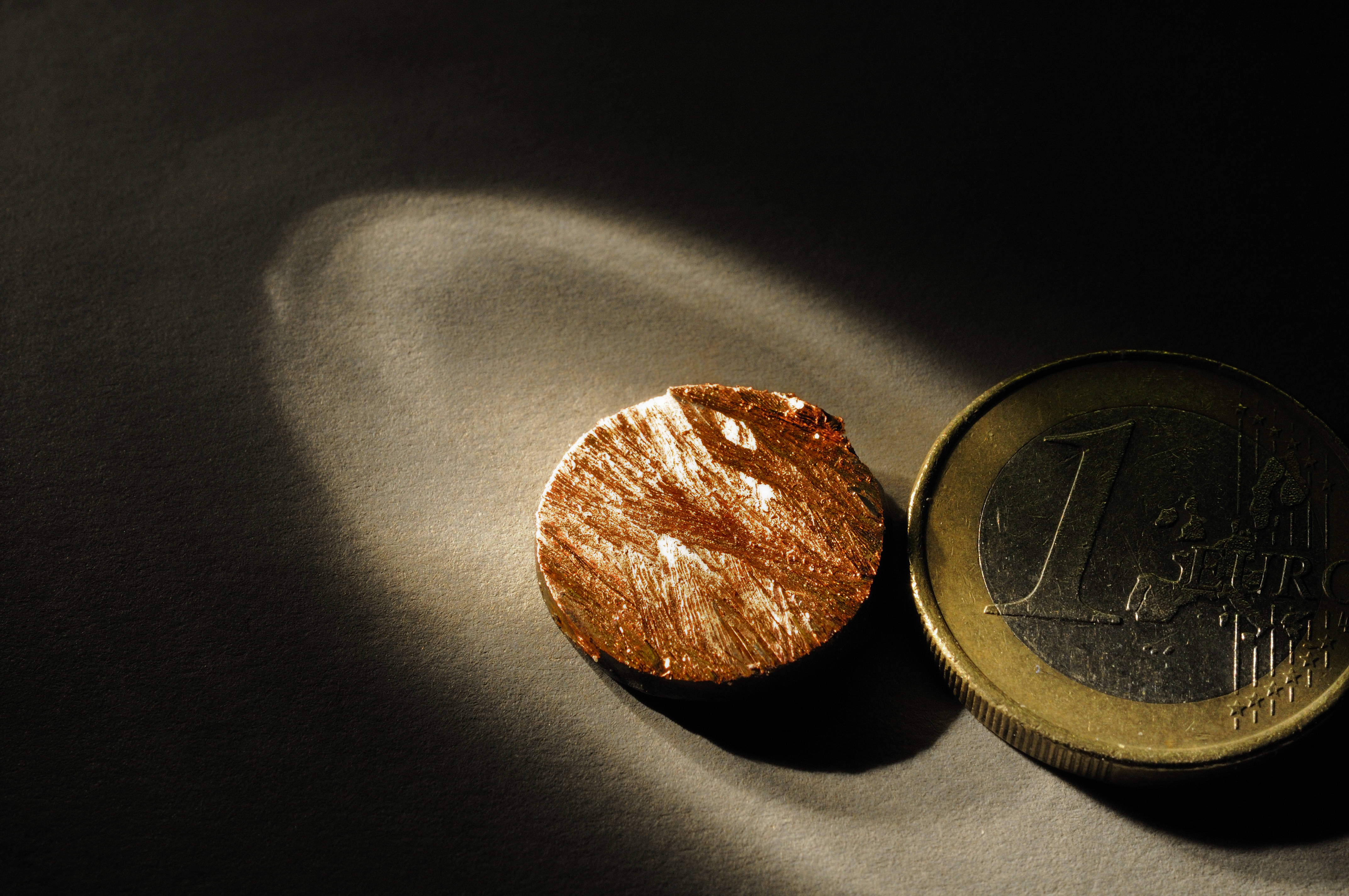 Koffer: Frësch ofgeseete Rondel aus rengem Koffer mat Verglach. De Kranz vum Euro ass aus Néckel-Messeng.